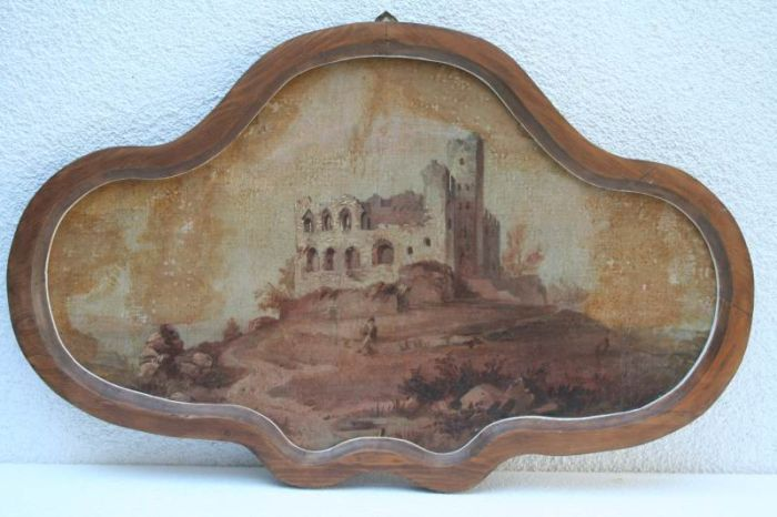 Gemälde, Öl auf Leinwand, auf Karton aufgezogen; Holzrahmen; Größe ohne Rahmen 36 X 62,5 cm